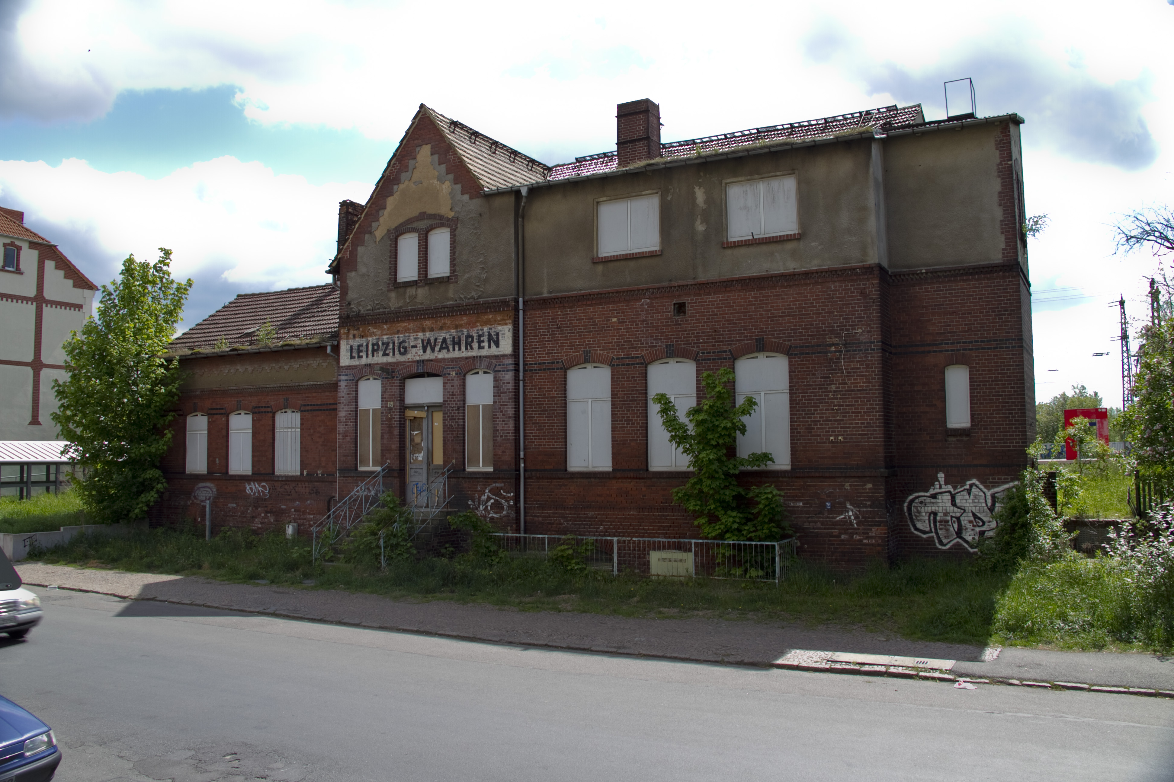 Bahnhofsgebäude Leipzig Wahren 2012